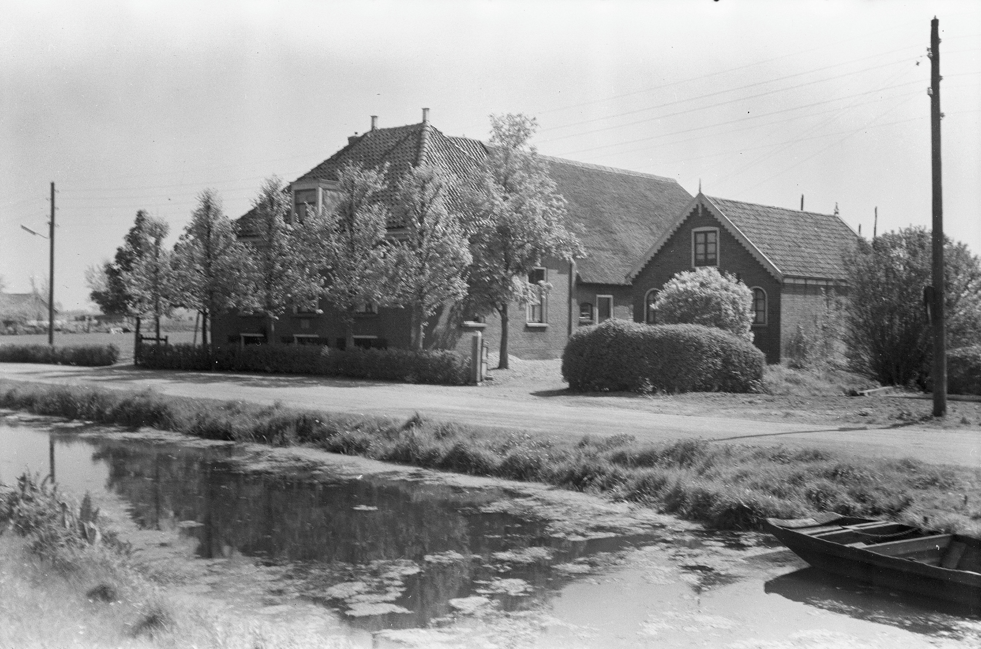 overzicht